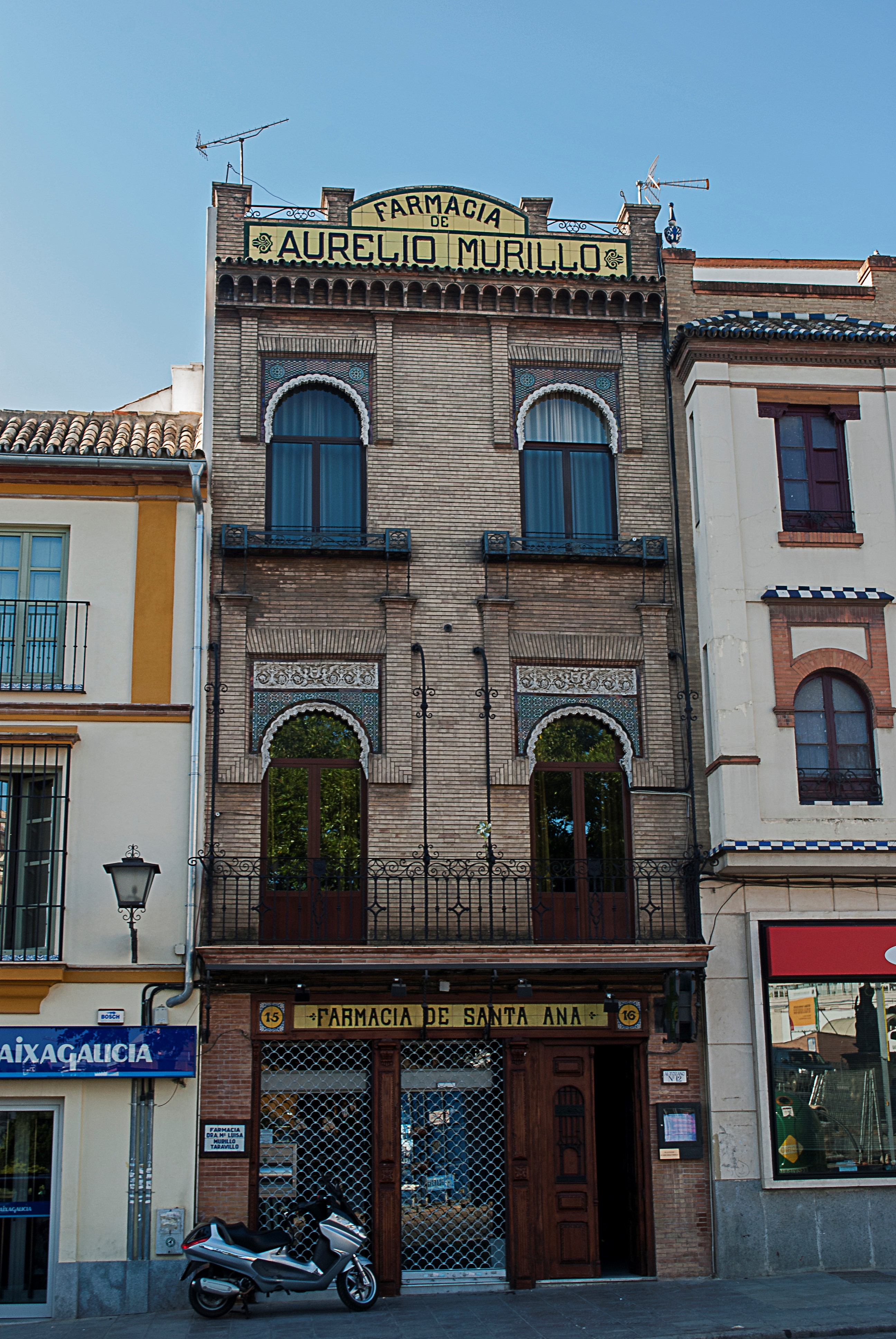 Edificio de la farmacia de Aurelio Murillo. Arquitecto:José Espiau y Muñoz, Año:1912. Ubicación: Plaza del Altozano, Sevilla, España.